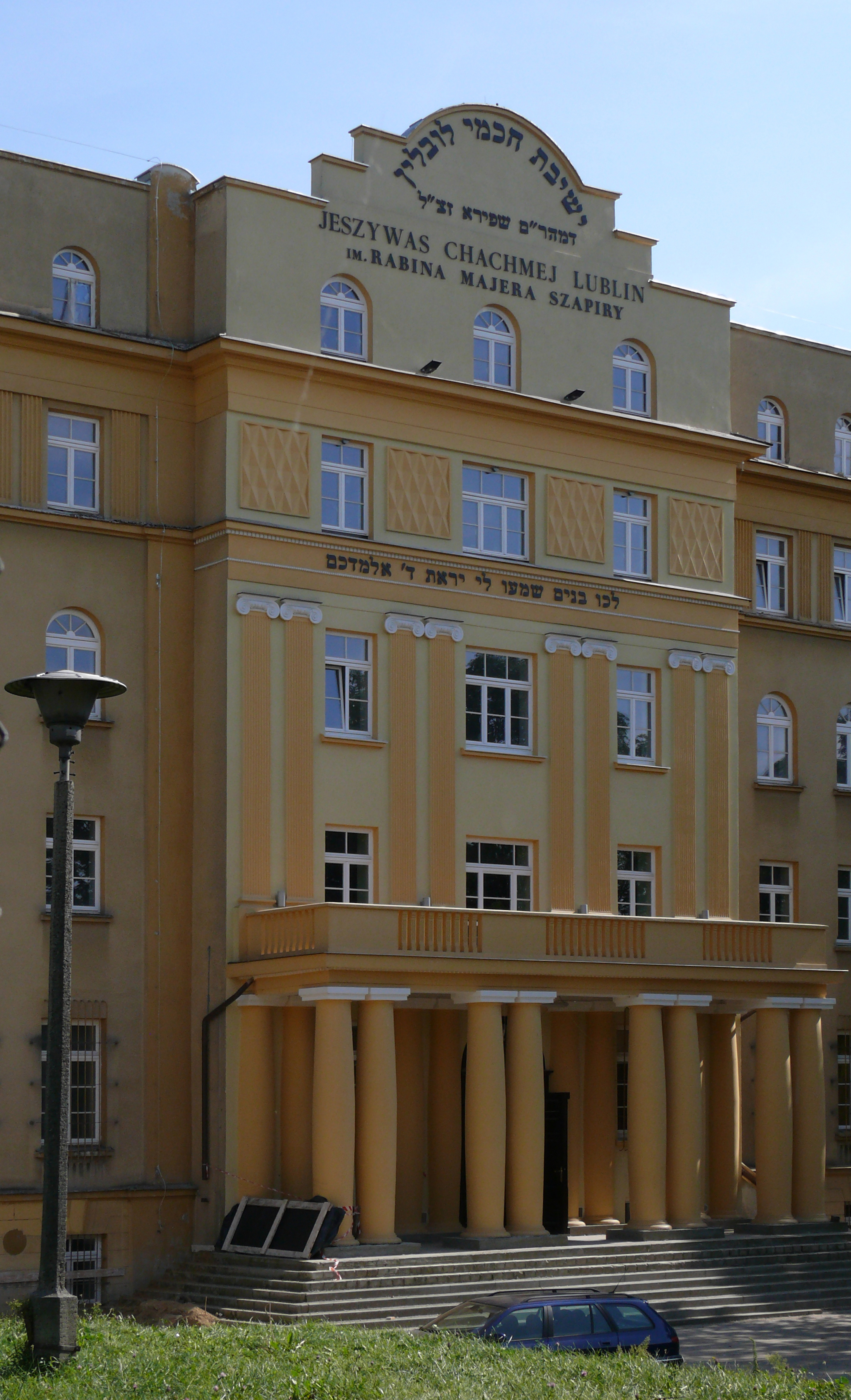 Jesziwa - uczelnia rabinacka w Lublinie. Budynek odzyskany przez Gminę od Akademii Medycznej.